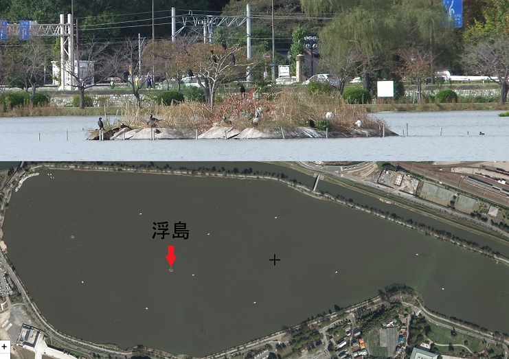 茨城県水戸市の千波湖の国土地理院2012-10-13撮影の空中写真と、浮島の写真。